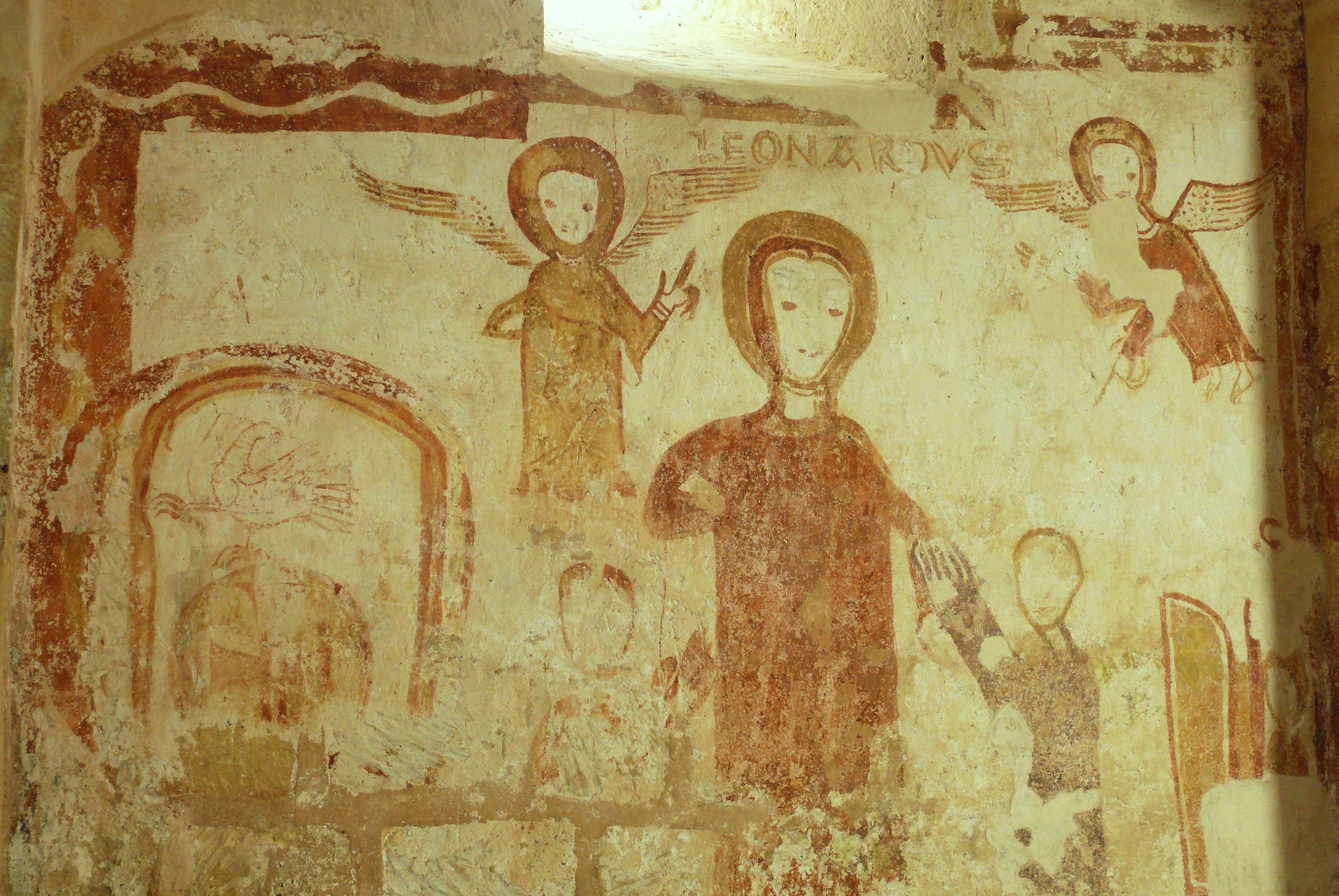 Montferrand-du-Périgord - Eglise Saint-Christophe - Saint Léonard libérant un prisonnier